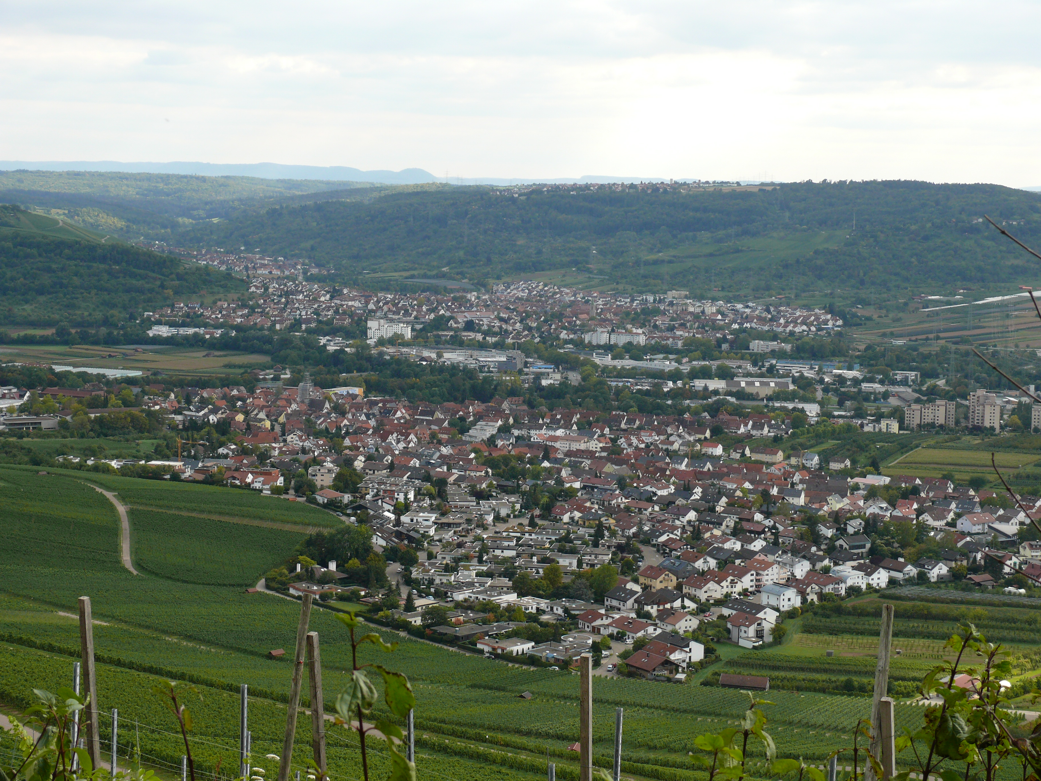 Blick auf Weinstadt aus nördlicher Richtung vom Kleinheppacher Kopf. Zu sehen sind im Vordergrund Grossheppach, dahinter Beutelsbach und links hinten im Tal Schnait.